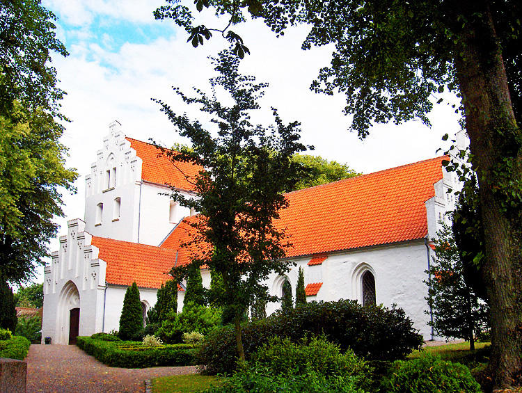 fra sydøst